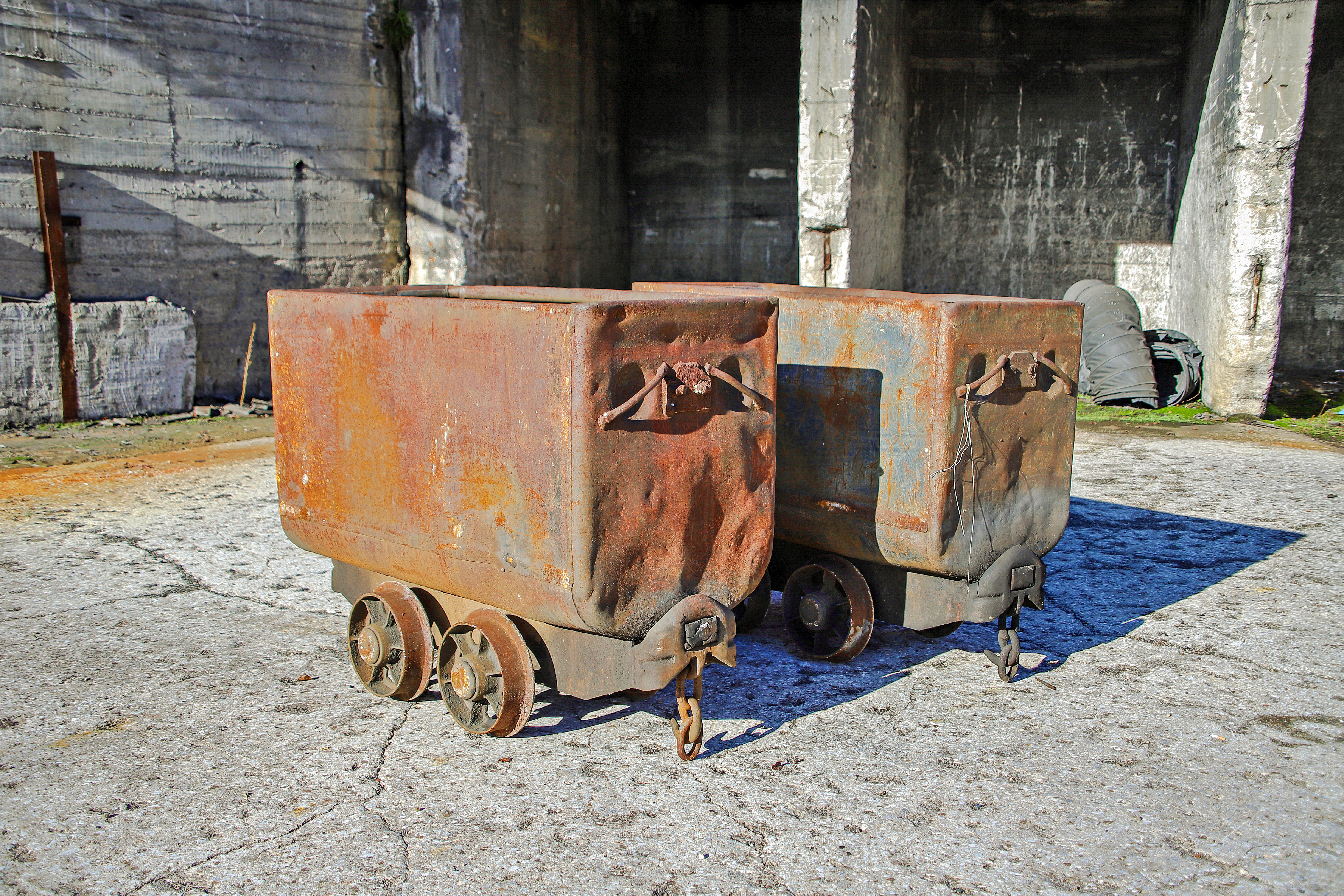 Matarrosa del Sil es una localidad que pertenece al municipio de Toreno, en la comarca de El Bierzo, provincia de León.